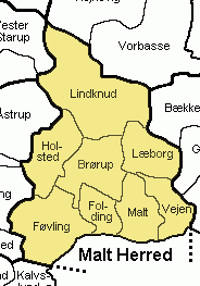 Malt Herred Ribe Amt, Denmark Map by Svend-Erik Christiansen , edited by Nico-dk.